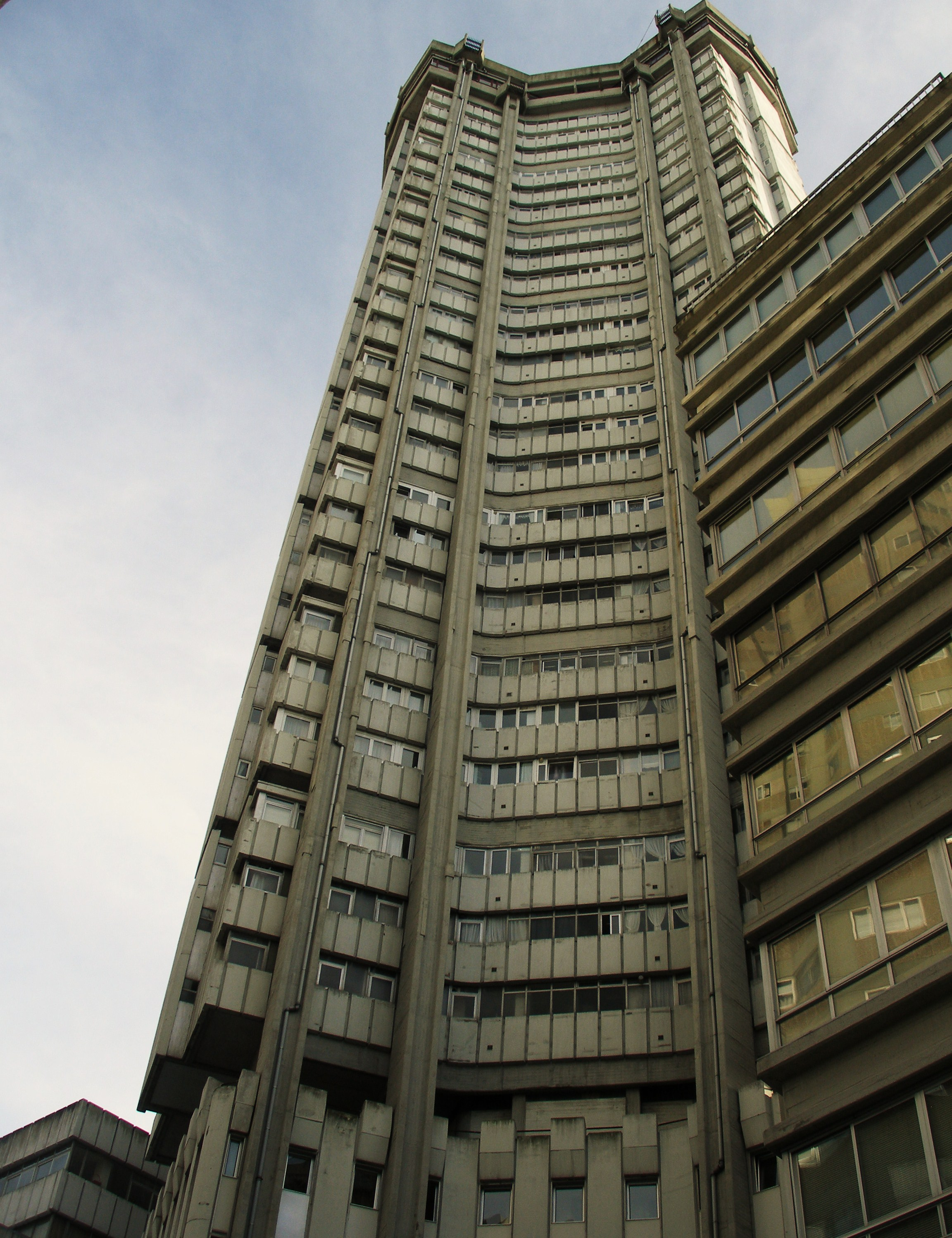 Hasta la construcción de los rascacielos de Someso, también en La Coruña, ha sido durante más de 30 años el edificio más alto de Galicia, con 119 metros de altura.